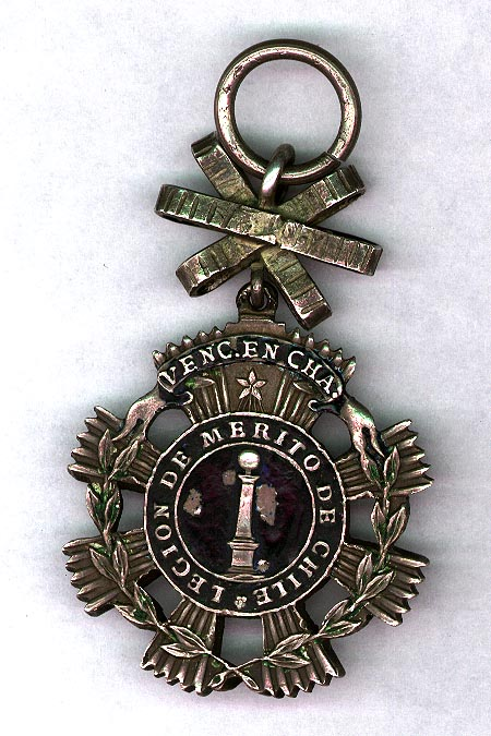 Anverso de la primera versión de la Legión de Mérito de Chile, otorgada a los que se distinguieron en la Batalla de Chacabucojunio de 1817.